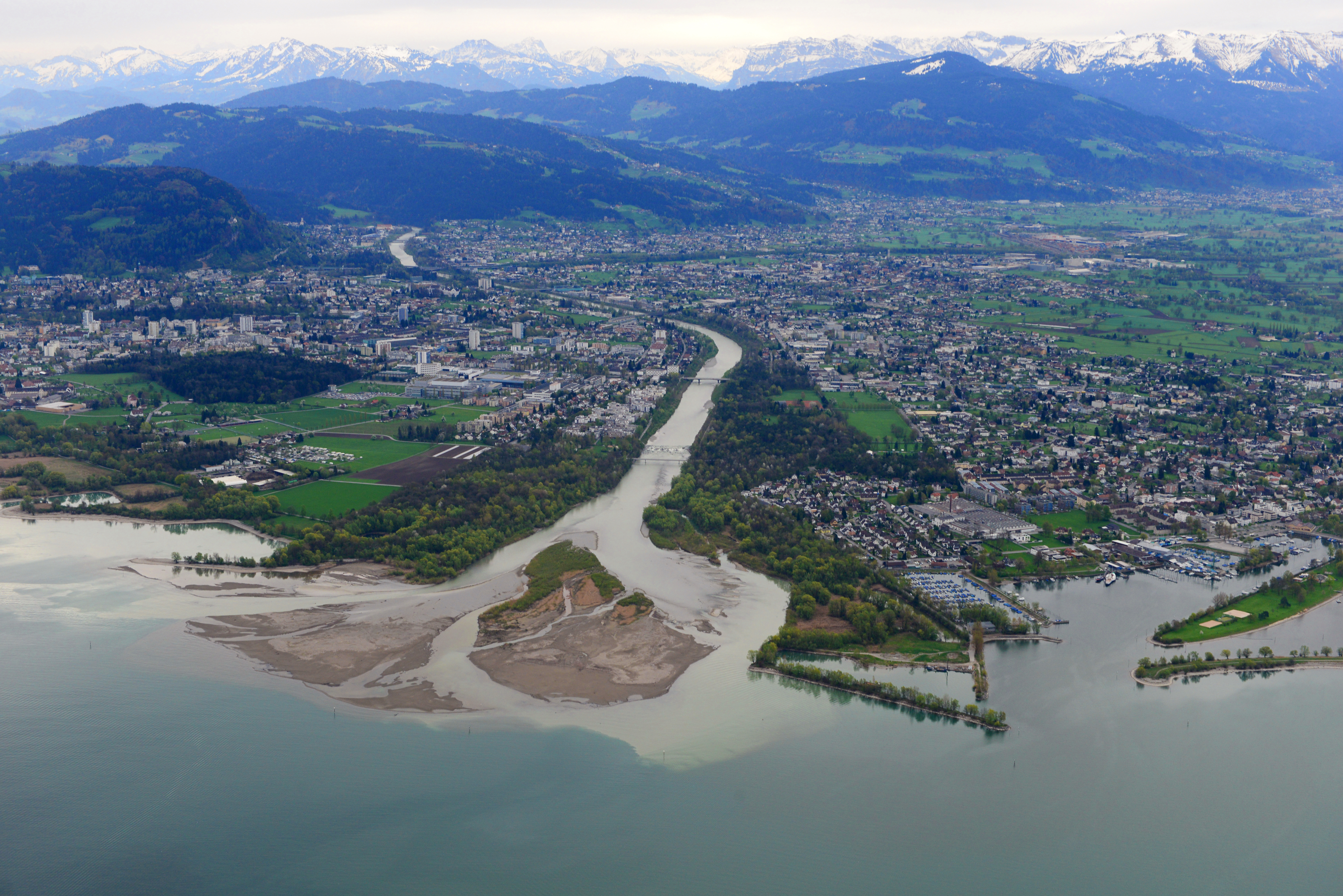 Delta, Mündung der Bregenzer Ach in den Bodensee.